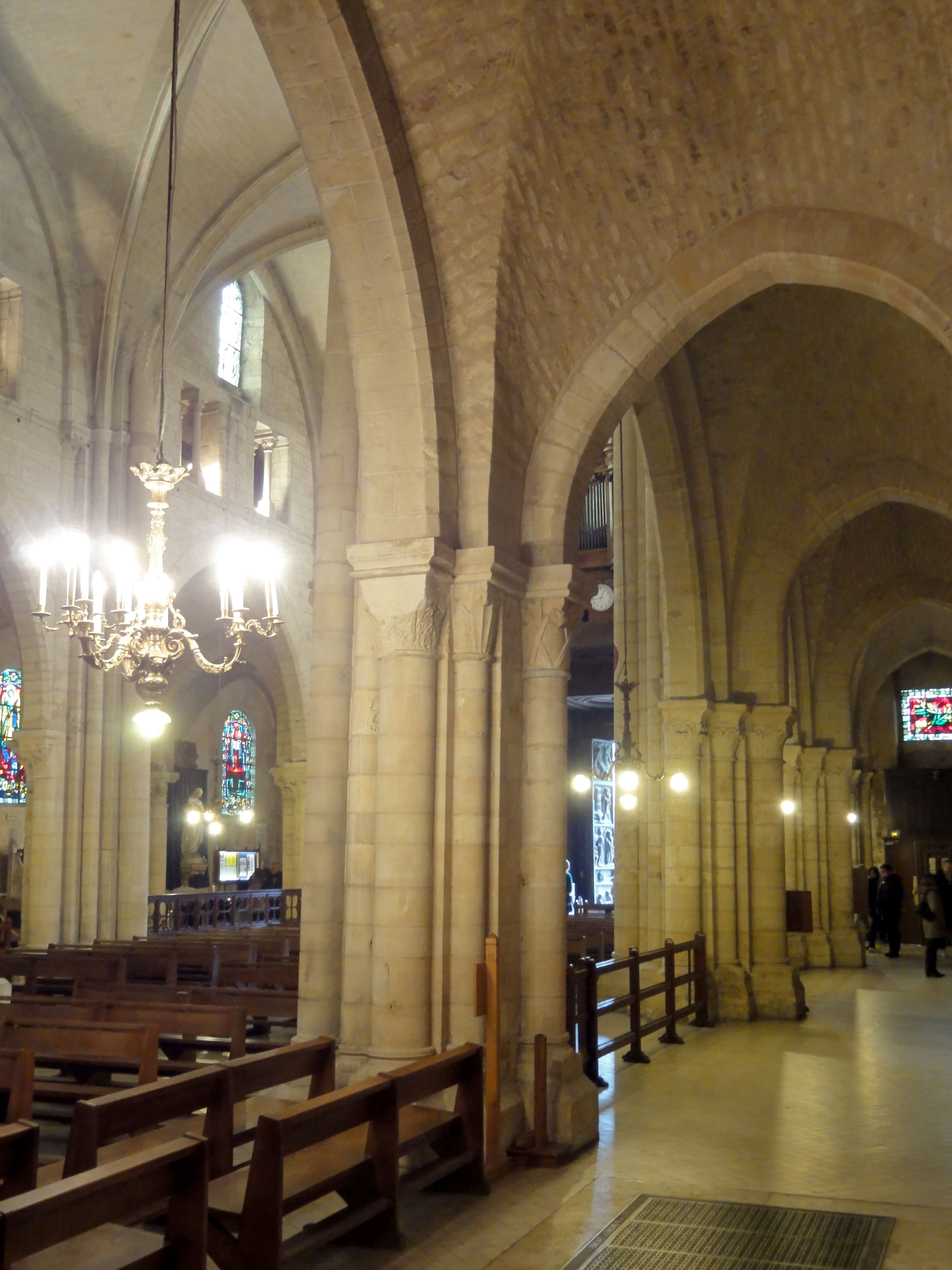 Bas-côté nord, 4e travée, vue vers l'ouest.